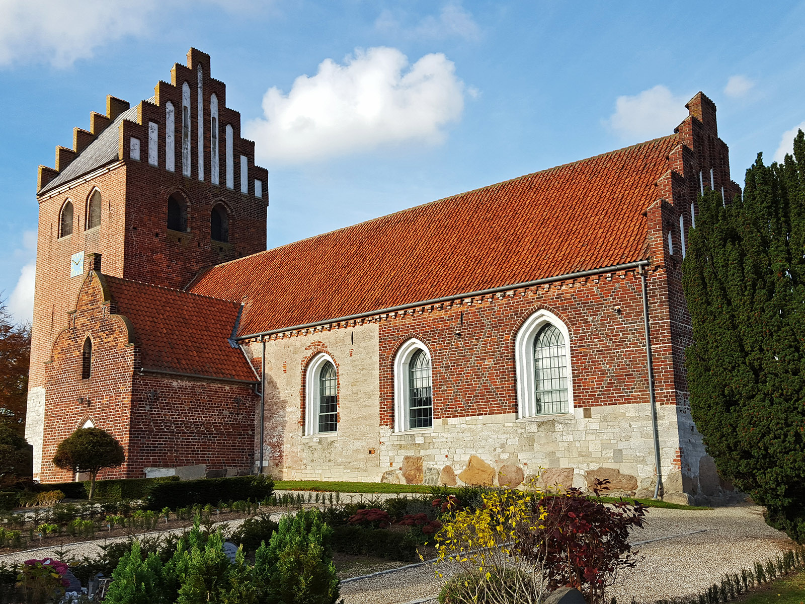 Høje Taastrup Kirke set fra sydøst